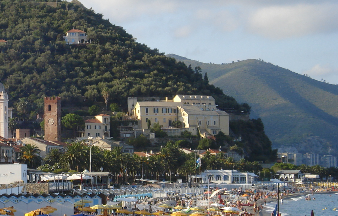 Vista sull'ex palazzo vescovile di Noli, ora trasformato in struttura alberghiera. Annessa all'edificio, la Chiesa di Nostra Signora delle Grazie.